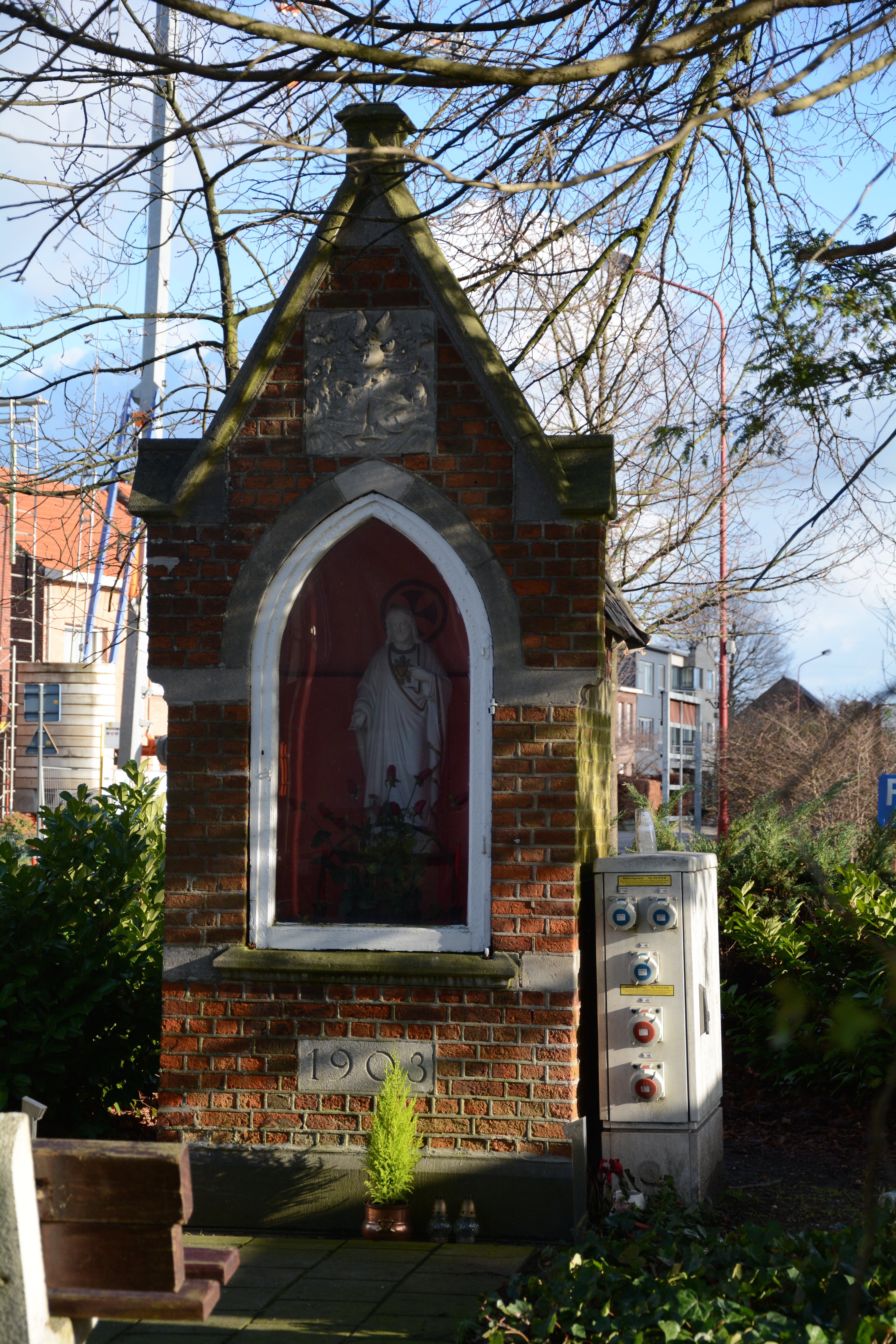 Heilig Hartkapelletje, Liersesteenweg, Lint